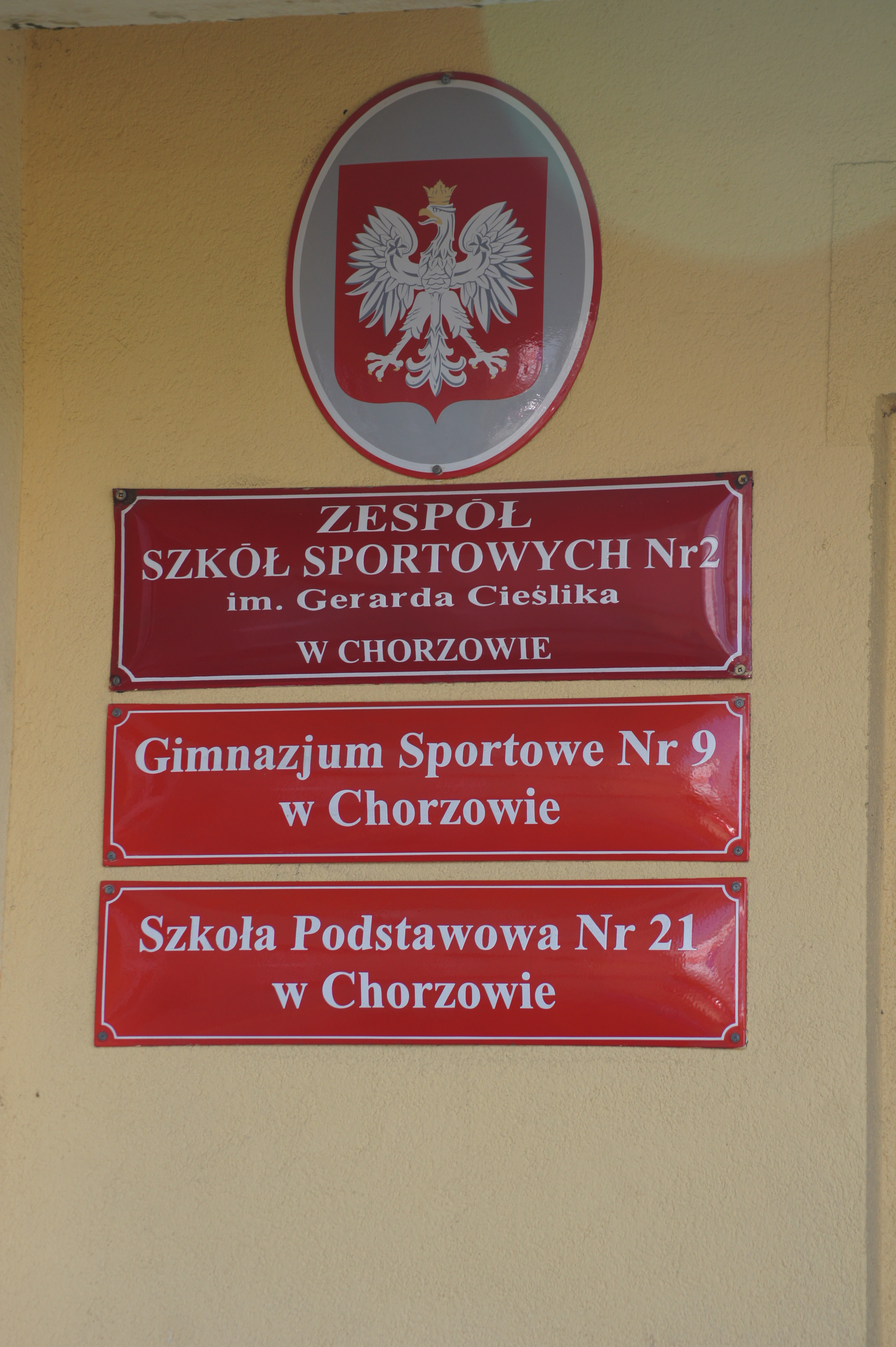 Zespół Szkół Sportowych w Chorzowie im. Gerarda Cieślika (tablica)